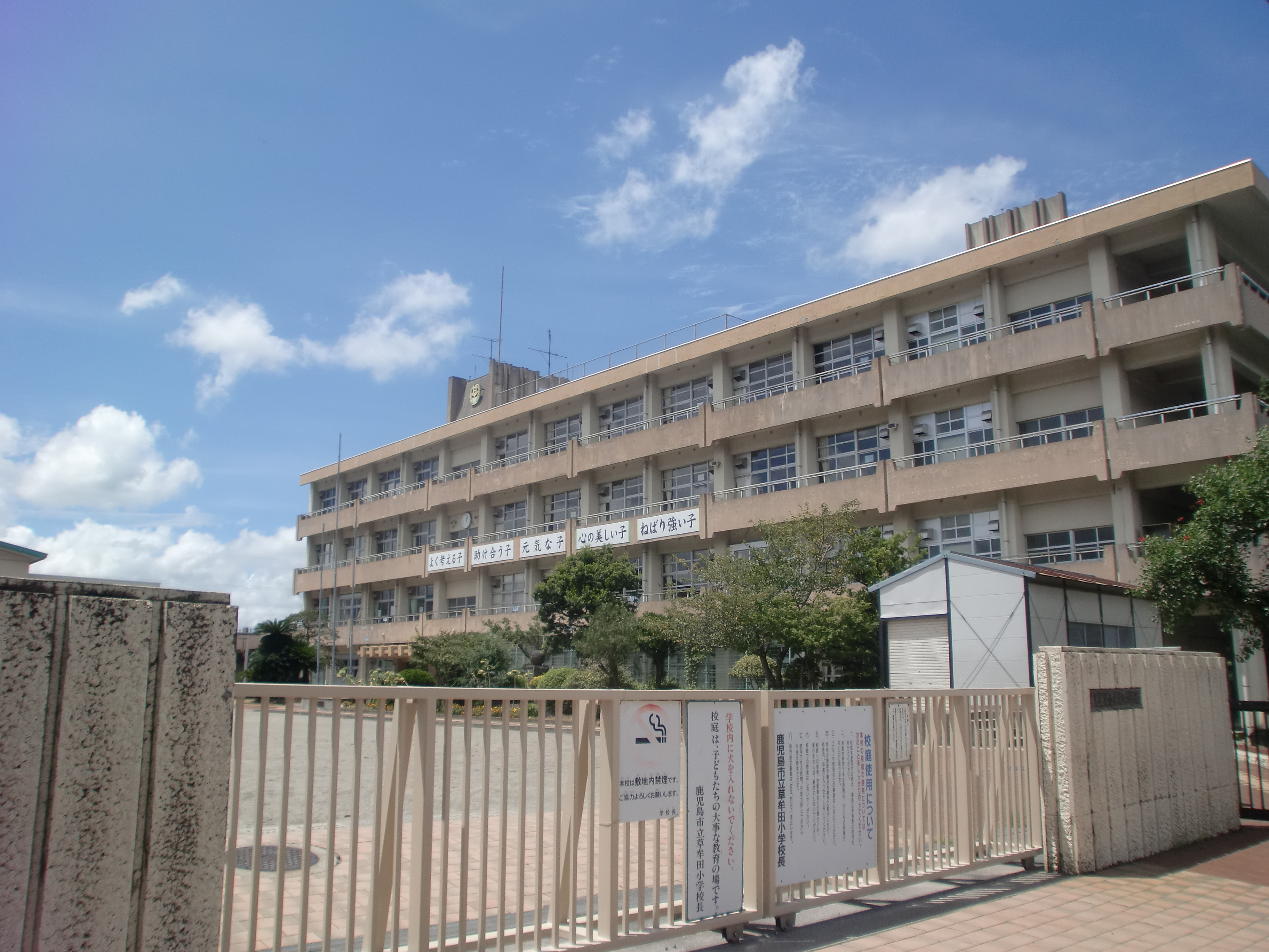 鹿児島市立草牟田小学校の外観。